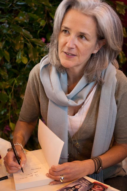 Tatiana de Rosnay au Salon du Livre en mars 2012